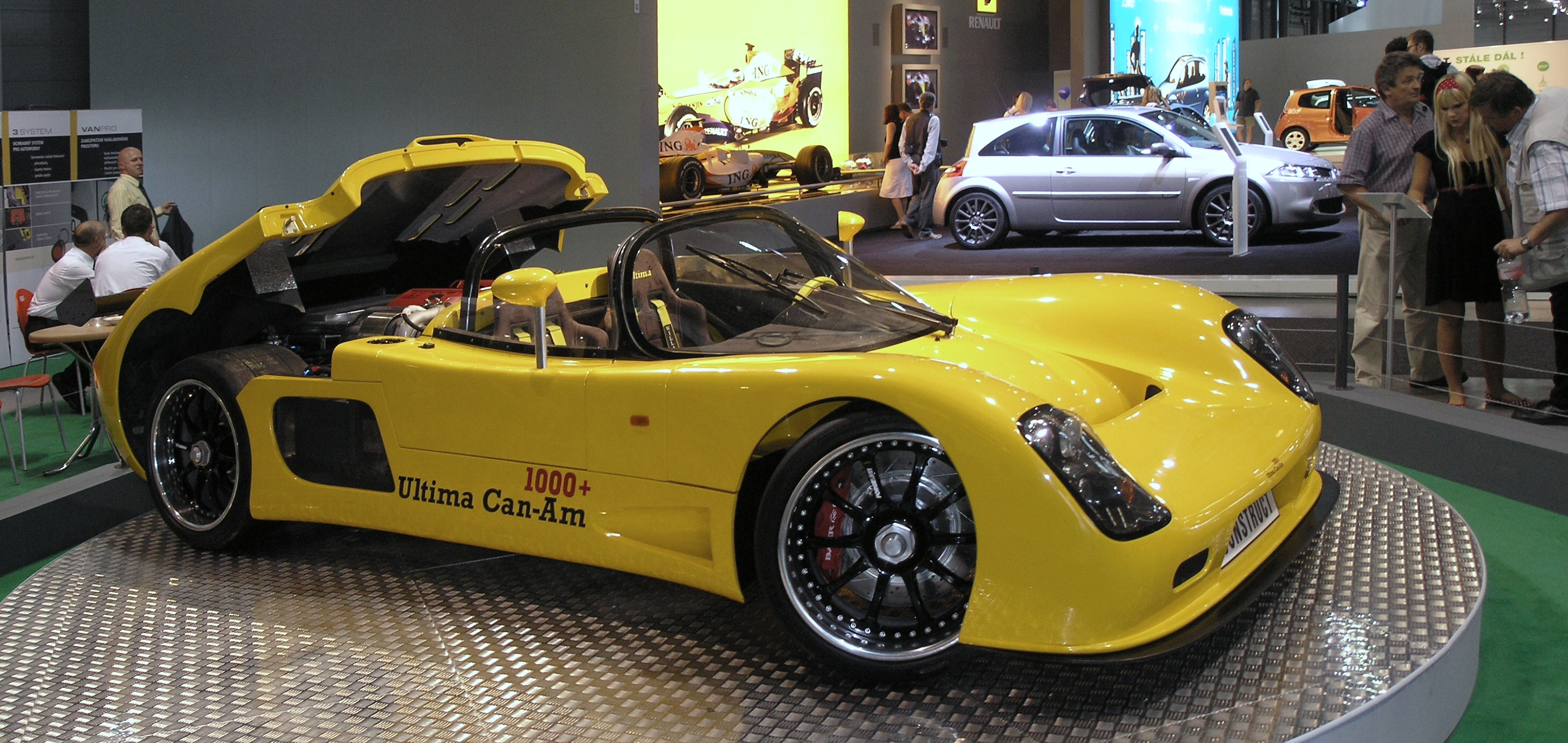 Autosalon Brno 2007 - Ultima Can-Am 1000+